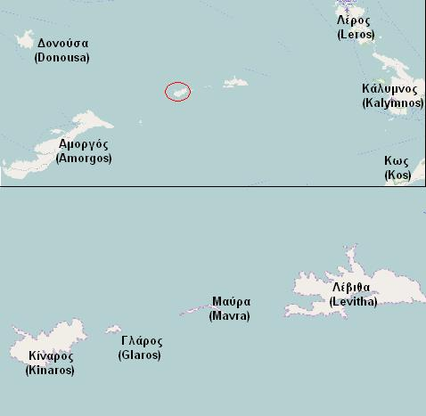 Κίναρος Λέρου This map may be incomplete, and may contain errors. Don't rely solely on it for navigation.